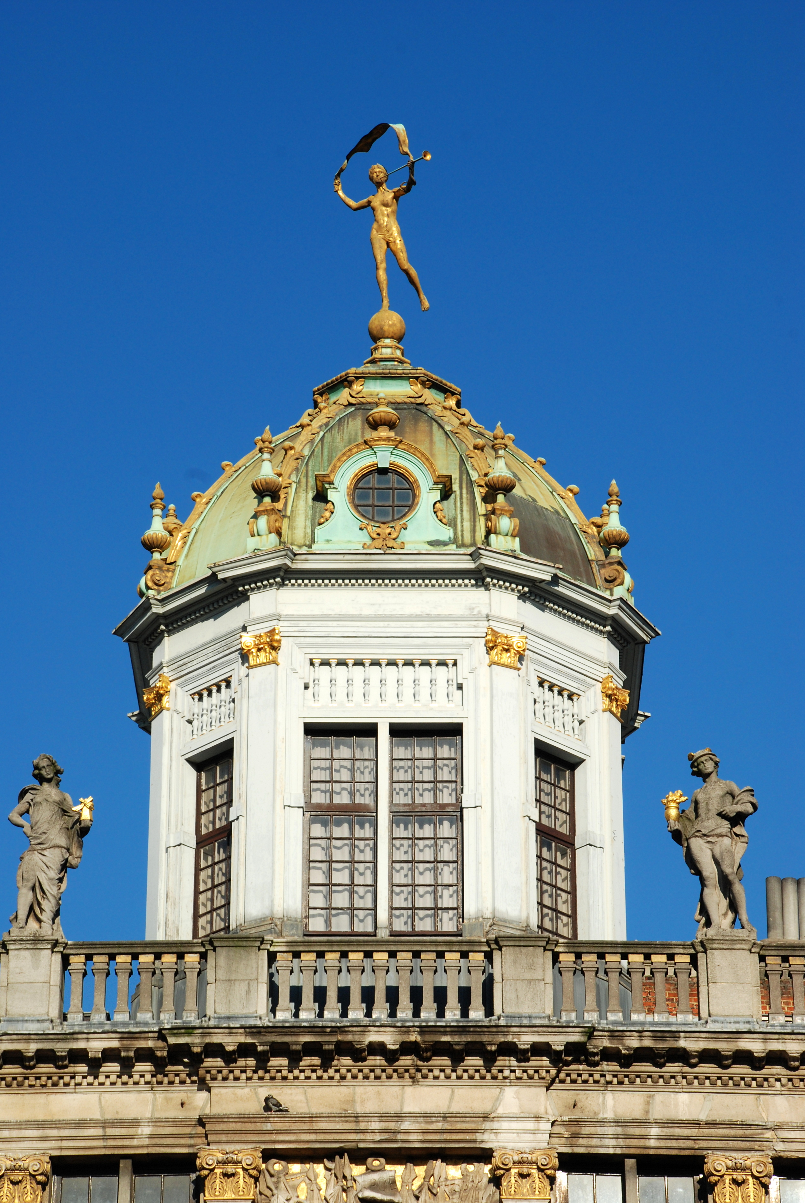 Belgique - Bruxelles - Grand-Place - Maison du Roi d'Espagne